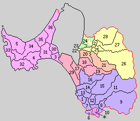 秋田県南秋田郡の町村。